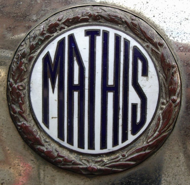 Logo Mathis, constructeur automobile français Author: Rémi Stosskopf Date: 25 august 2006